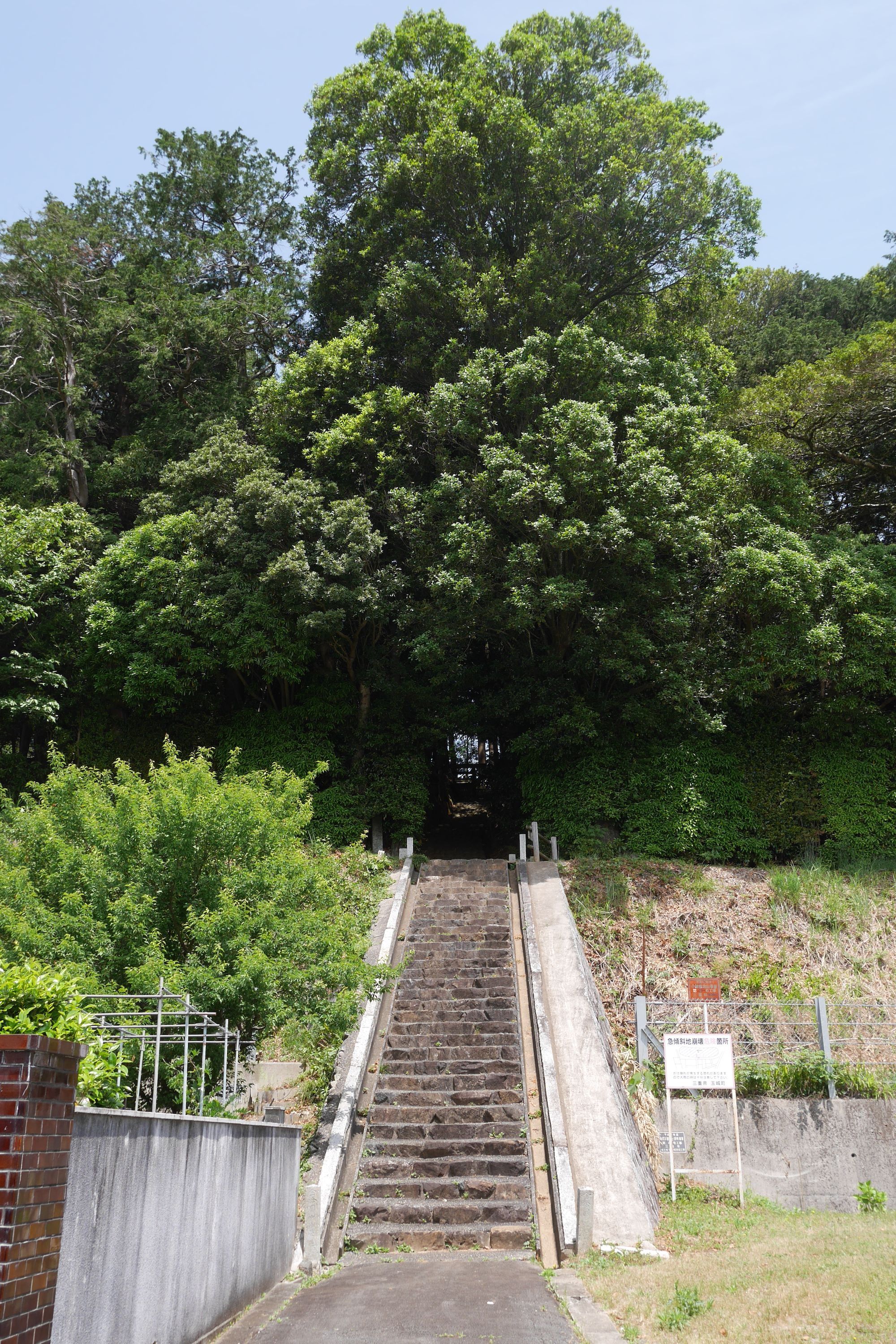 日本の三重県度会郡玉城町上田辺にある皇大神宮摂社の棒原神社の参道の石段。